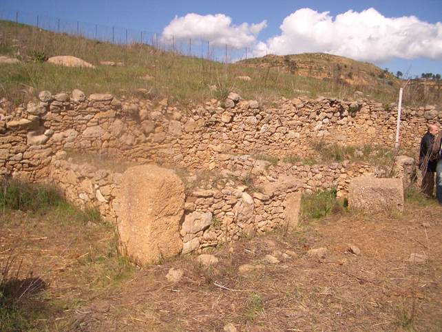 Necropoli, monte San Mauro, Caltagirone, Italia